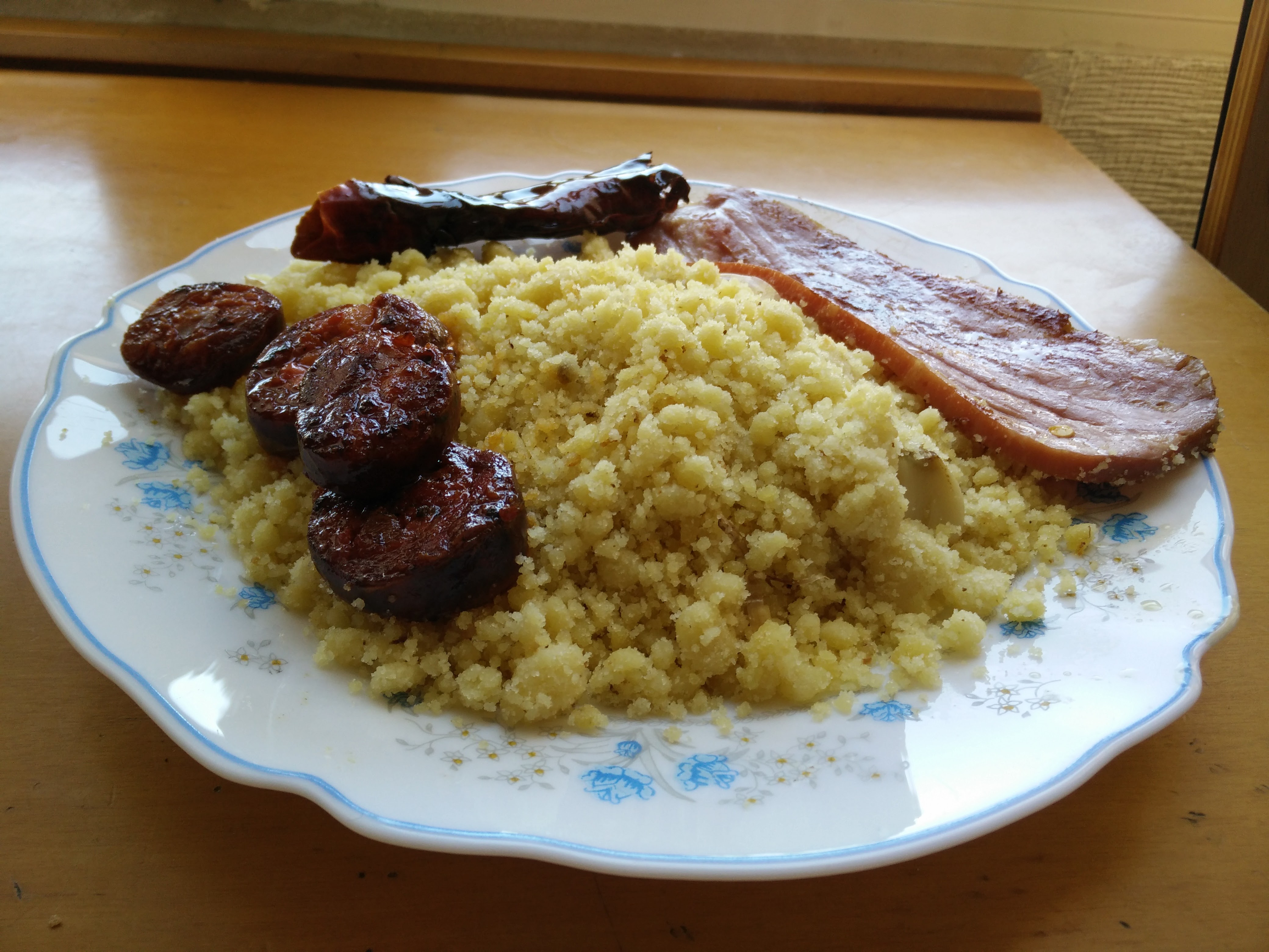 migas de Almería, hechas con sémola